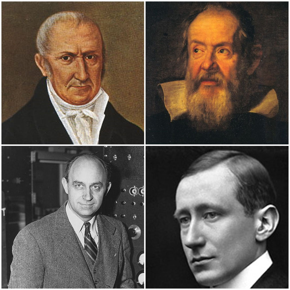 Collage di quattro foto su scienziati italiani.